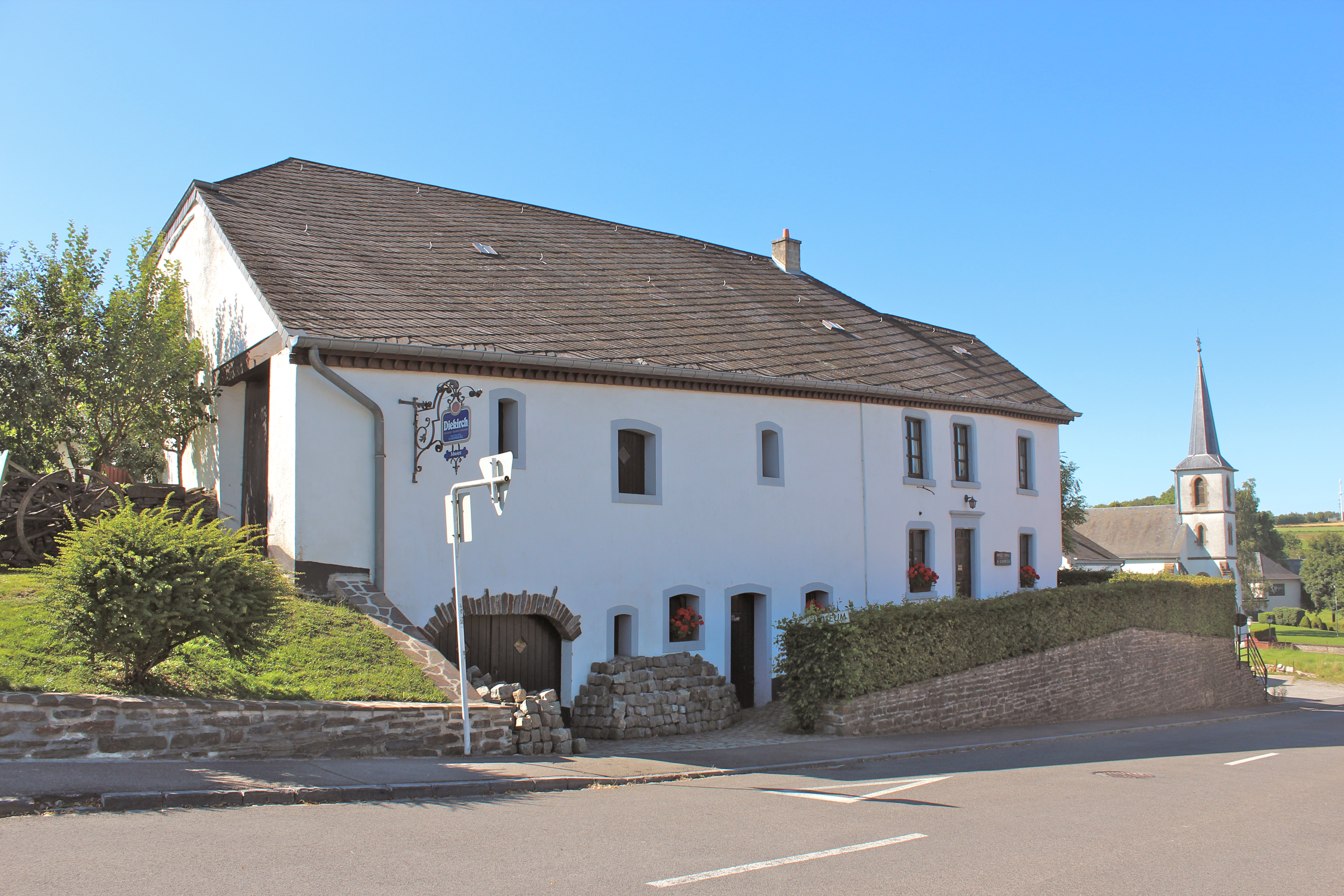 Le musée rural à Binsfeld, Luxembourg.